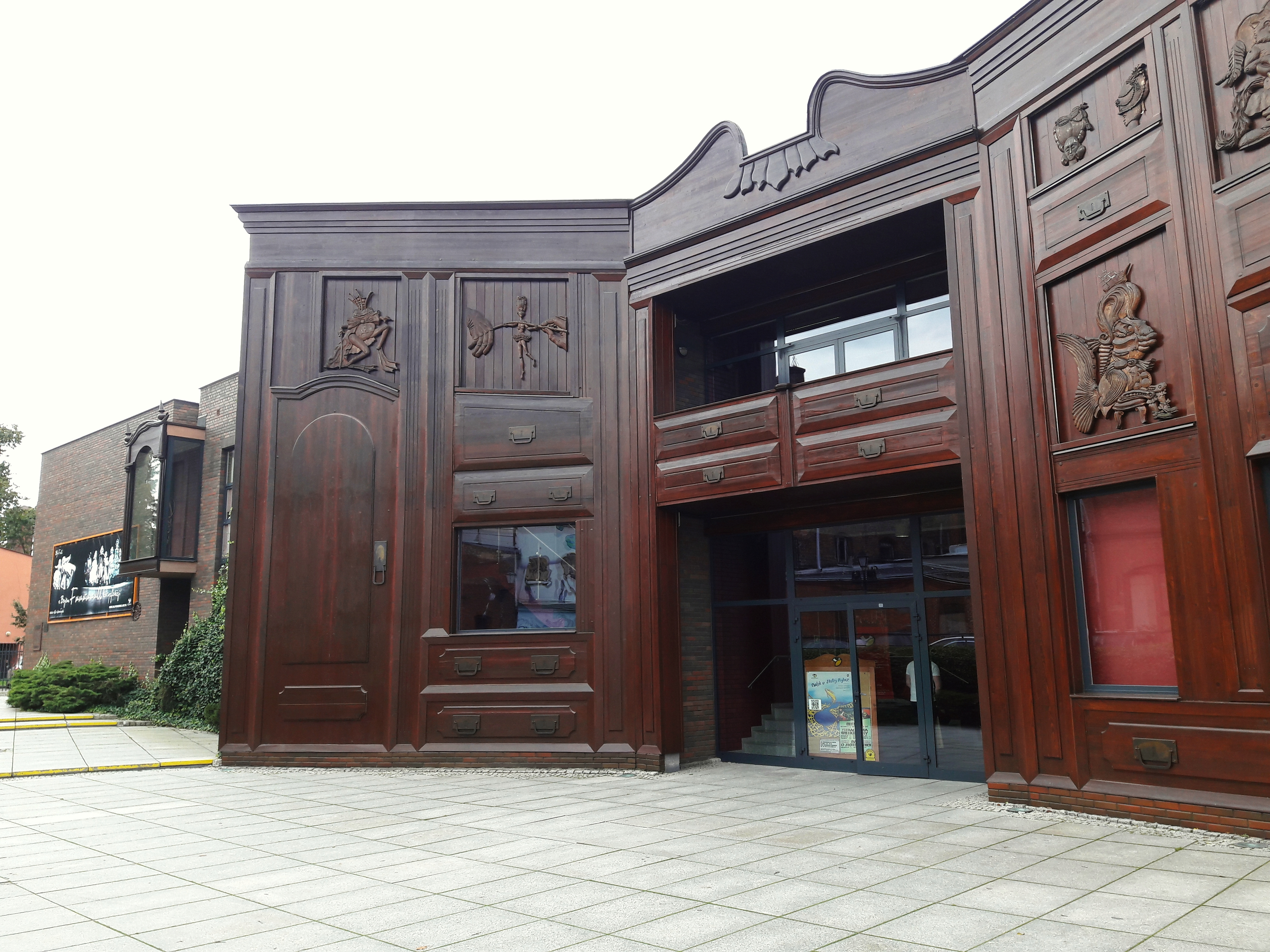 Baj Pomorski Theatre in Toruń.